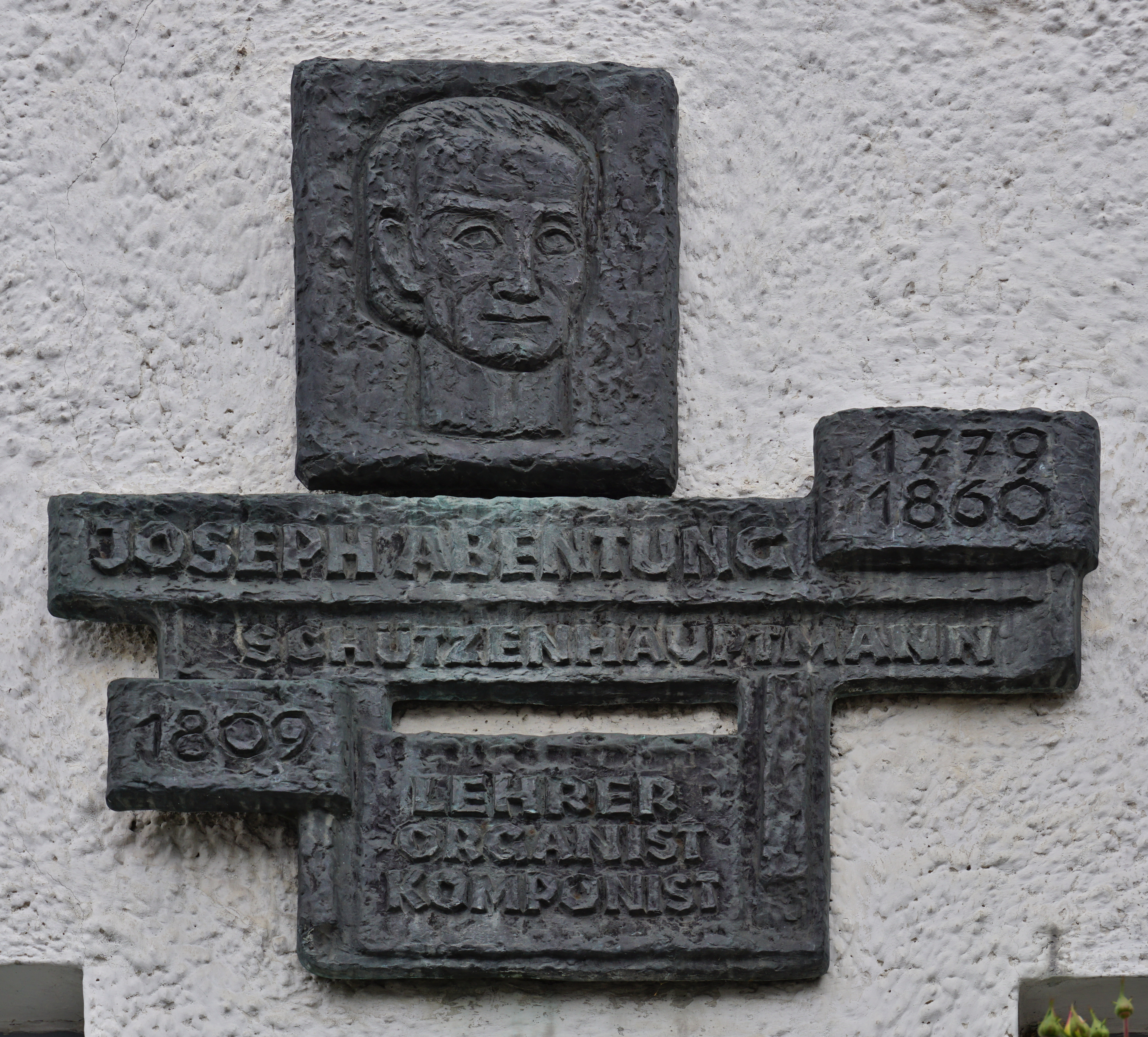 Gedenktafel für Josef Abenthung in Götzens, Kirchstraße 4 Künstler: Franz Pöhacker, geb. 1927 This media shows the remarkable cultural object in the Austrian state of Tyrol listed by the Tyrolean Art Cadastre with the ID 35668. (on tirisMaps, pdf, more images on Commons, Wikidata)